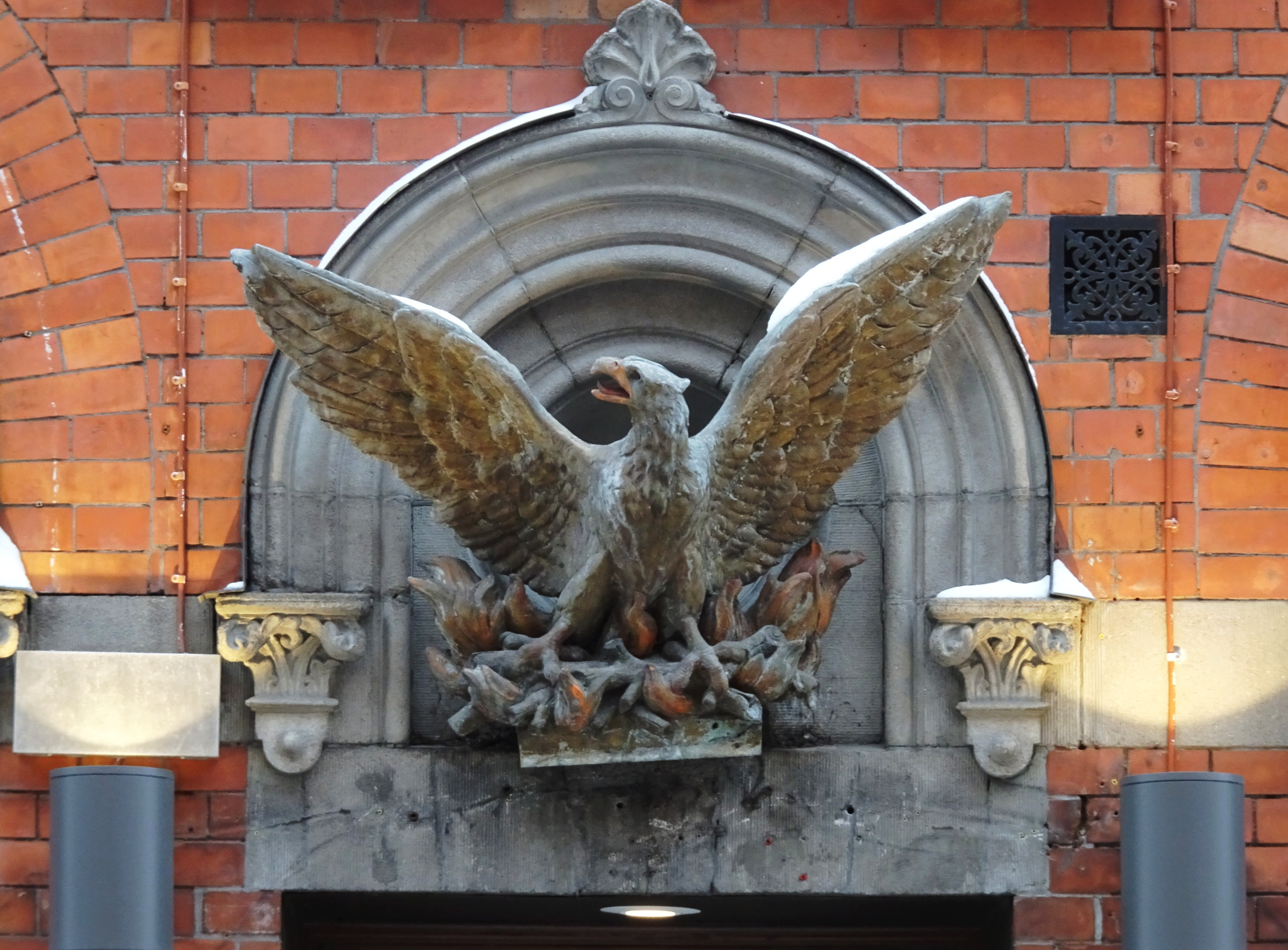 Fastigheten Västergötland 20, Götgatan 40, f.d. Apoteket Fenix